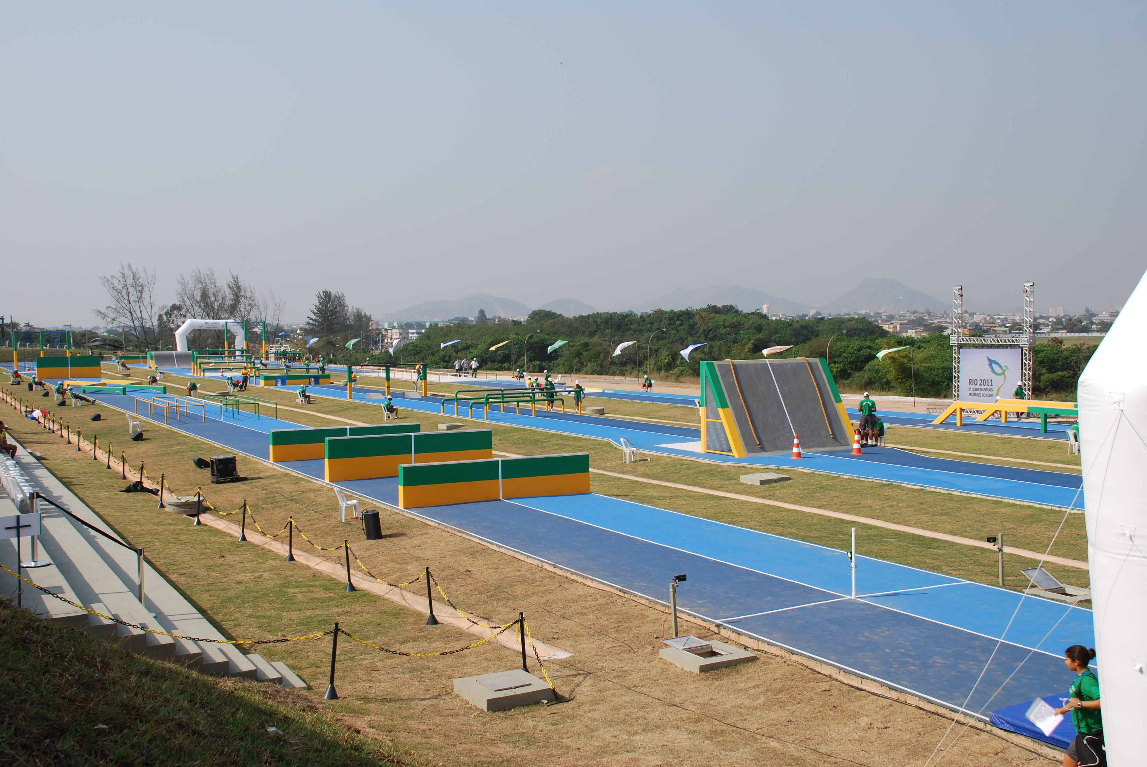 Hinderbanemomentet i militär femkamp